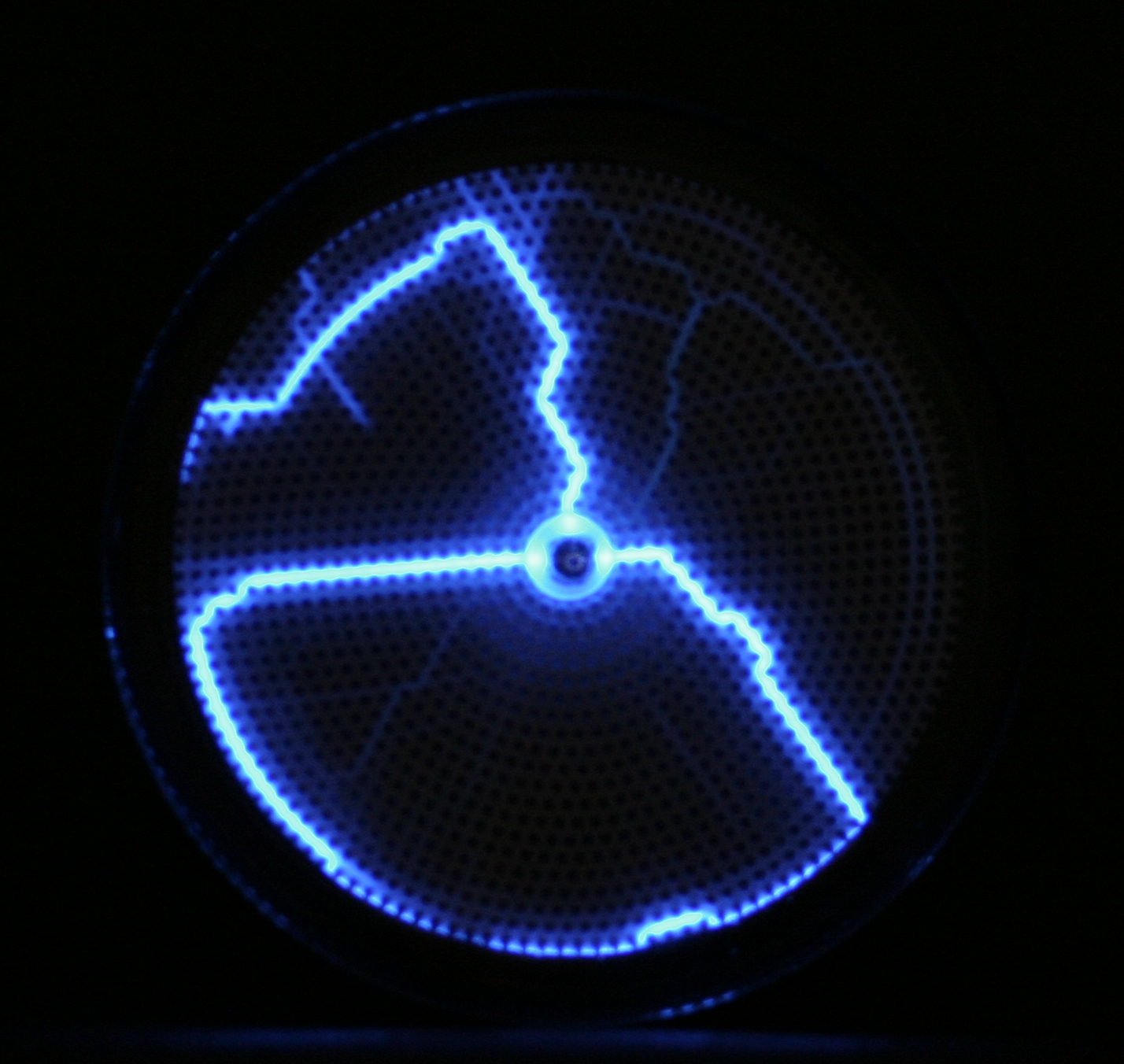 Eine kleine Plasmascheibe bei wenig licht.